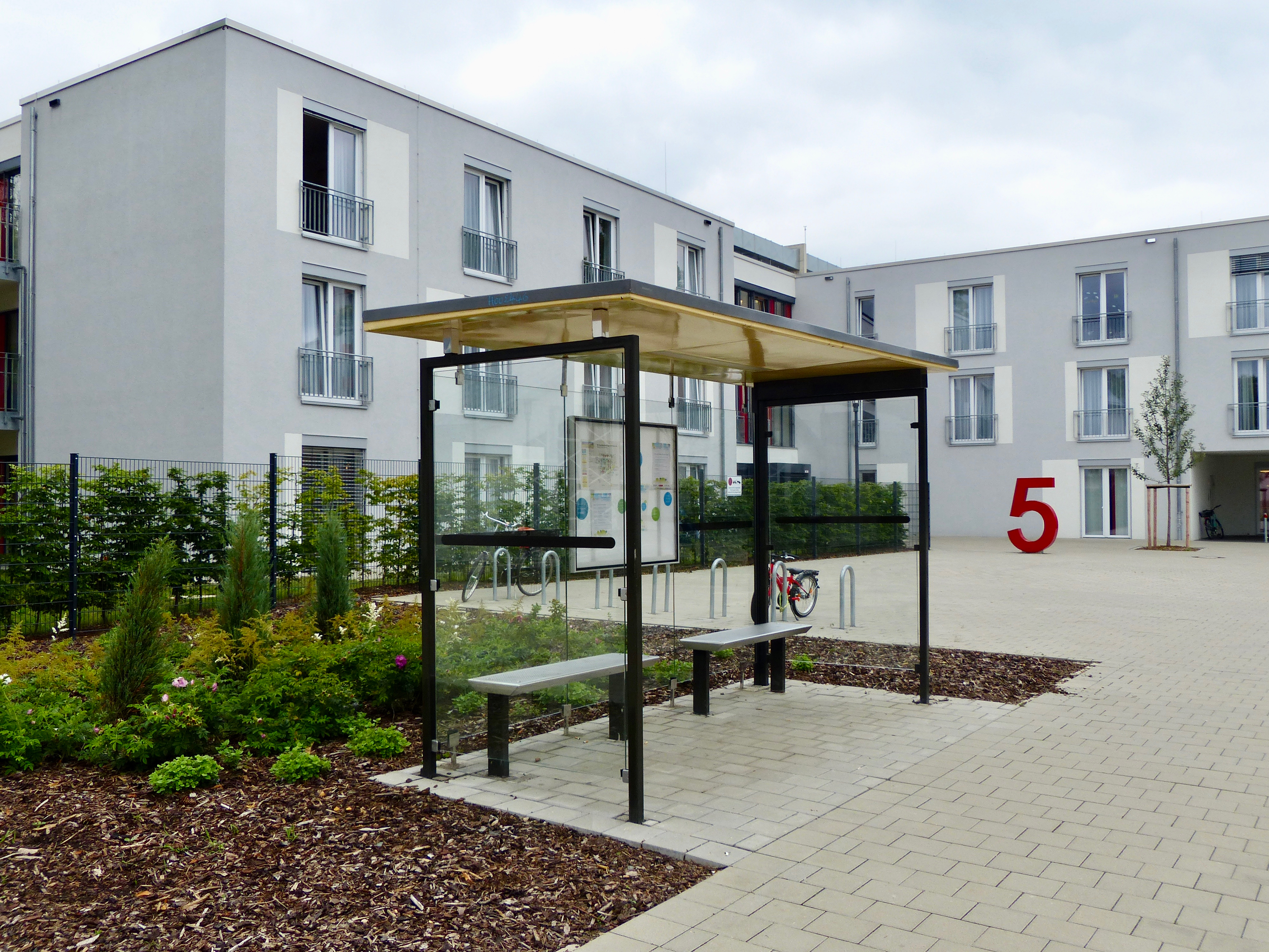 Riehler Heimstätten (2017): Neubau Haus 5, Scheinbushaltestelle im vordergrund